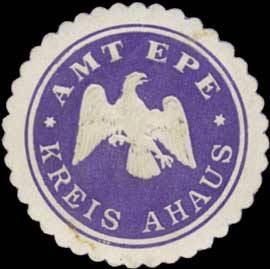 Sealing stamp Title: Amt Epe Kreis Ahaus Description: violett, weiß, geprägt Place: Epe size: 4 cm